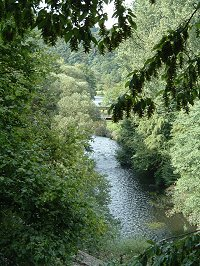 Wupper in Radevormwald-Dahlerau - Wupperverlauf mit Blick von der Wuppertalstraße (L 414) Richtung Wülfingstraße. Mittig sieht man die Wupperbrücke von (l.) Bahnhof Dahlerau zur (r.) Wülfingstraße.